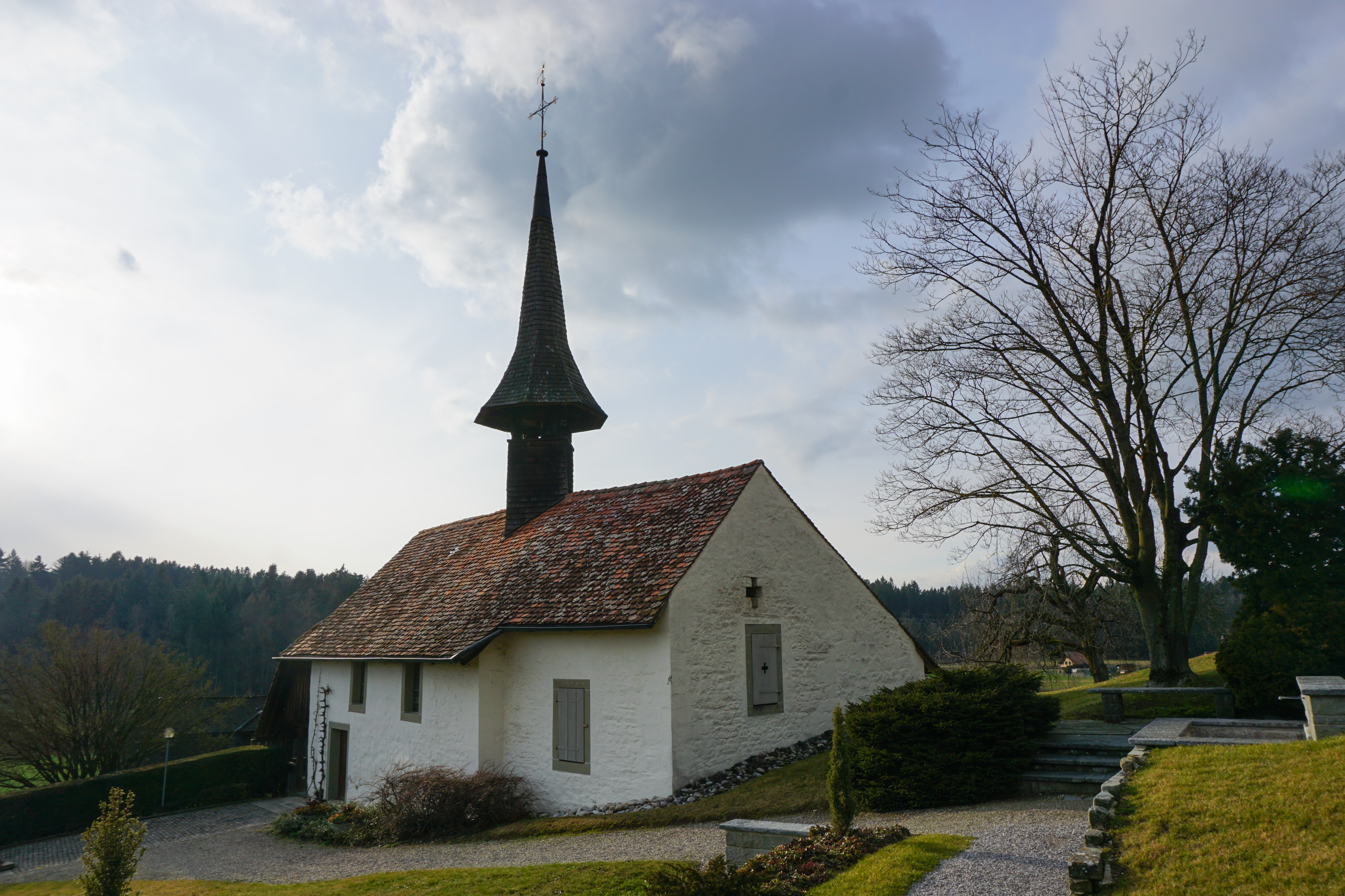 Rüti bei Lyssach, Kirche Südostansicht von Friedhof.